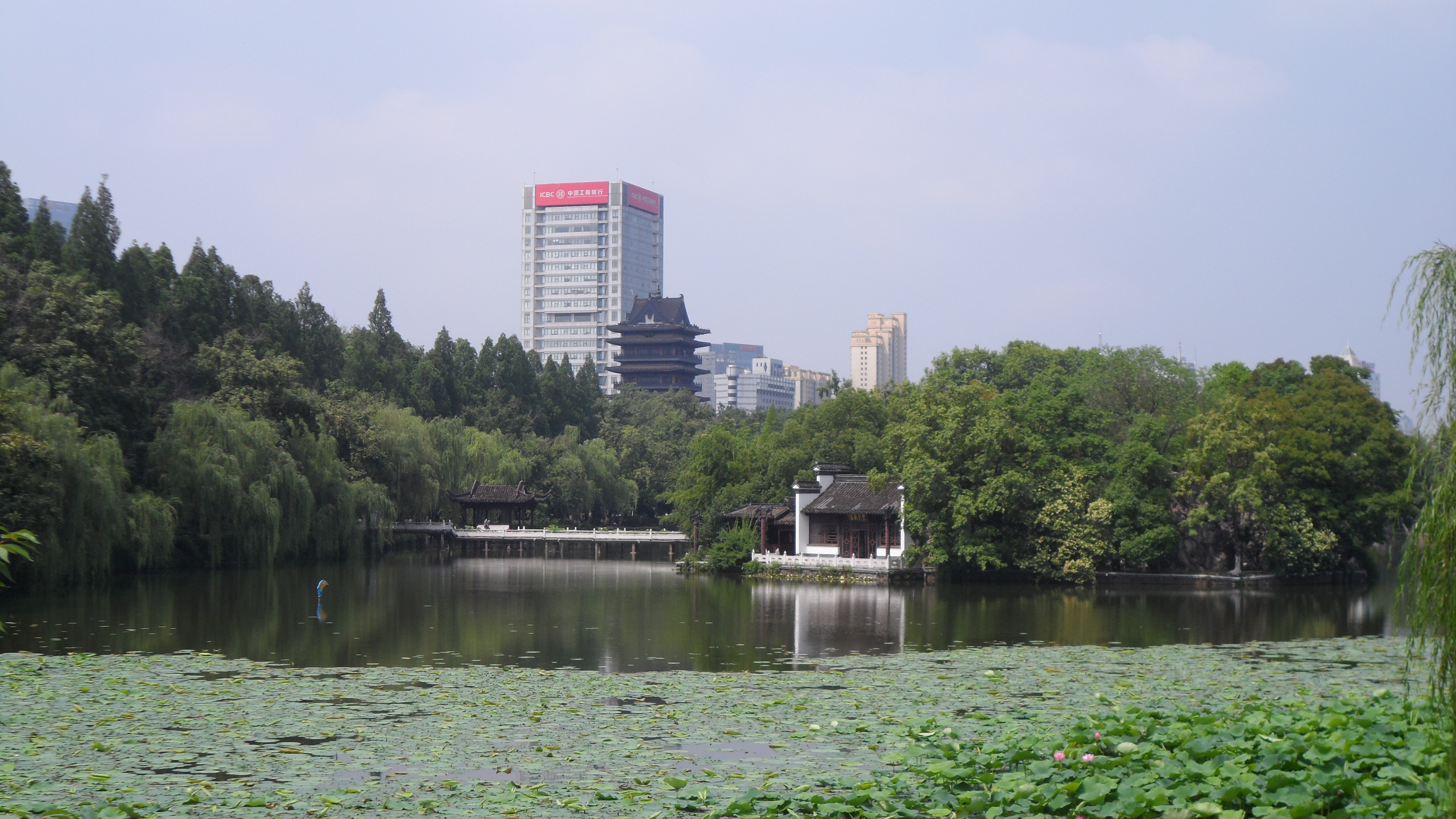 安徽合肥包公园